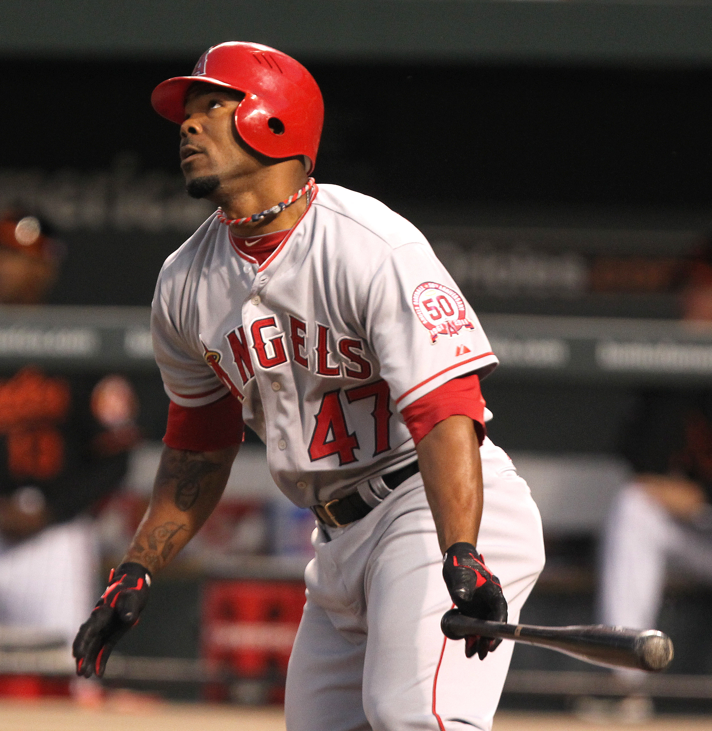 Howard Kendrick